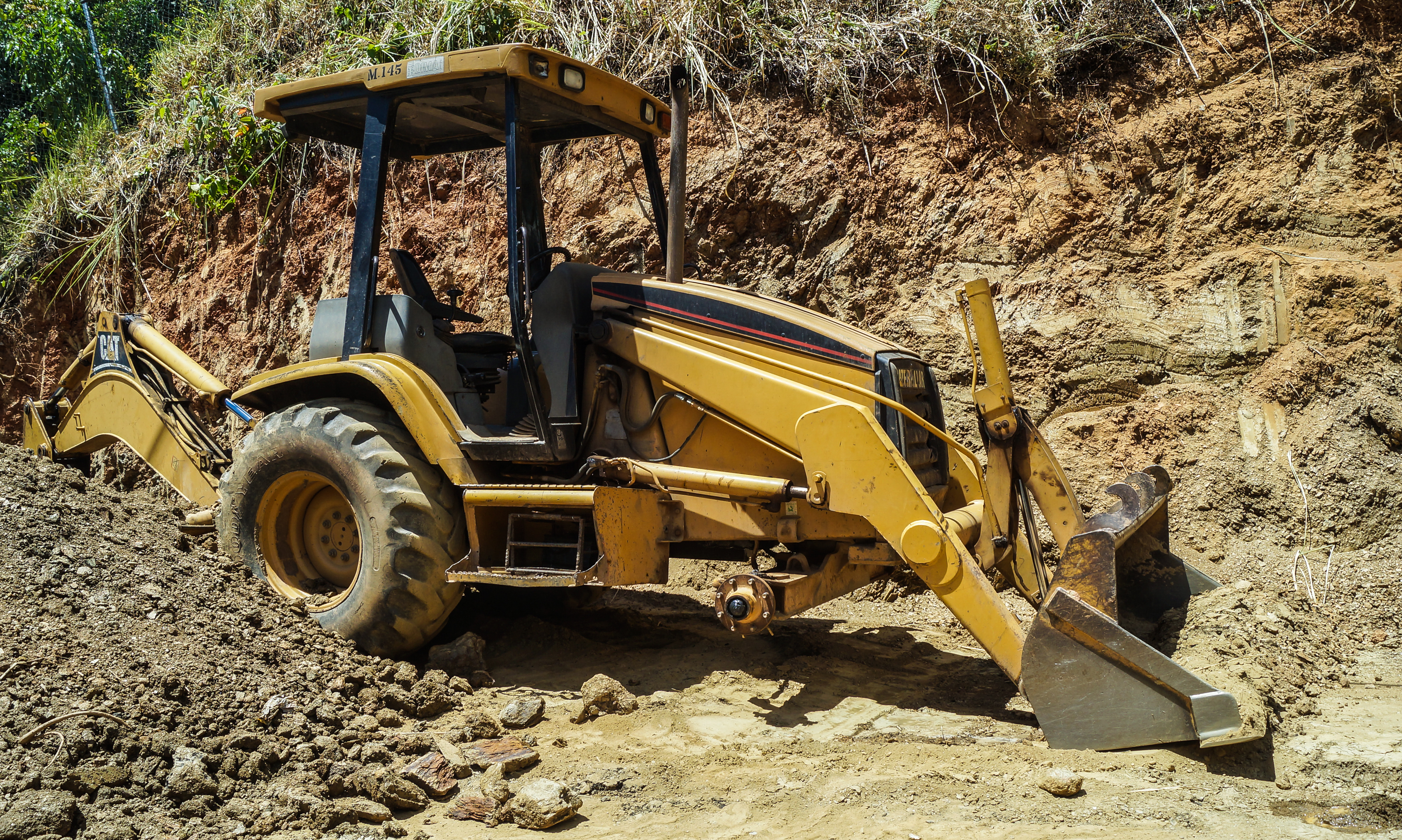 Excavadora